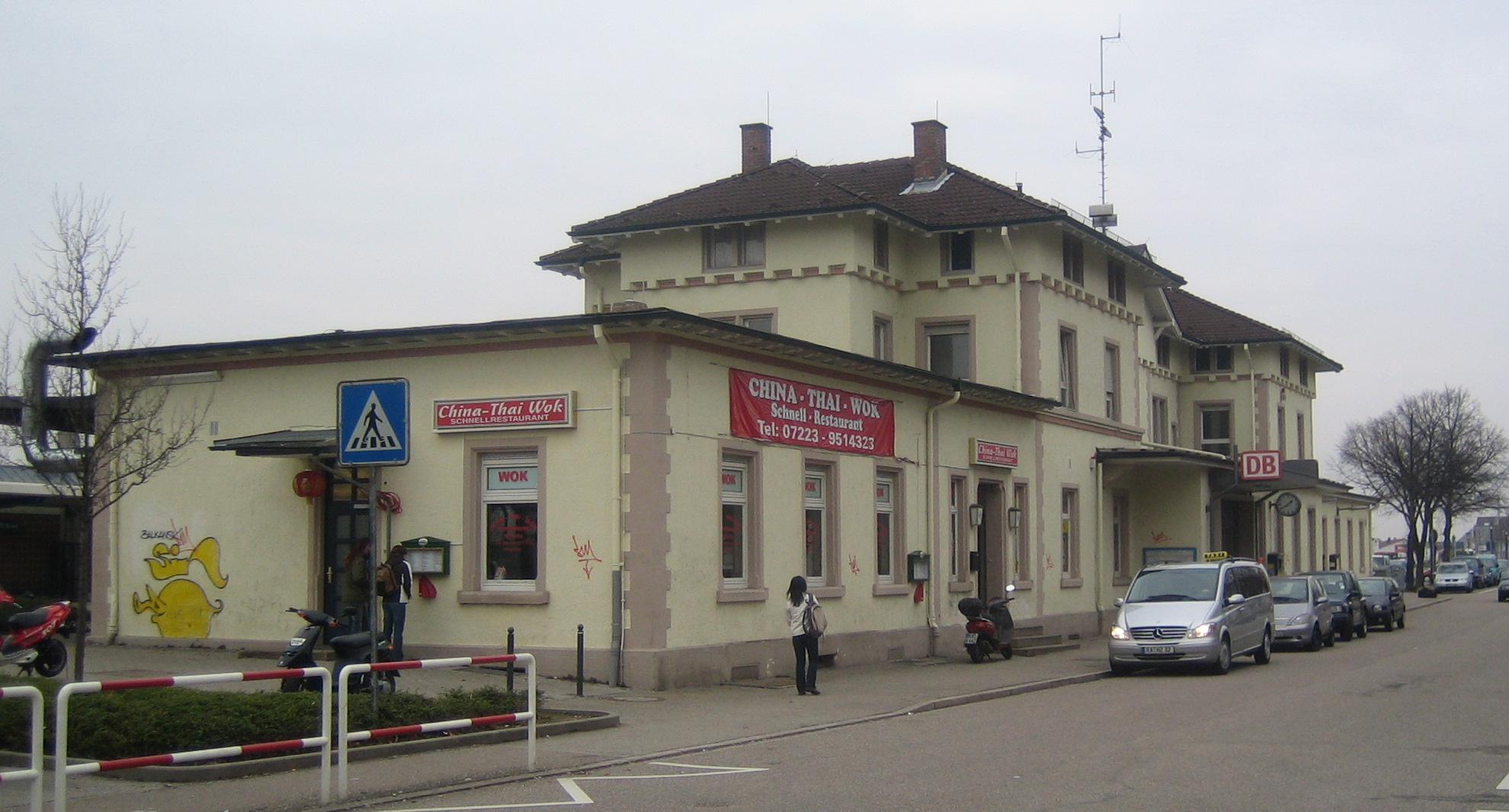 Bahnhof Bühl (Baden)